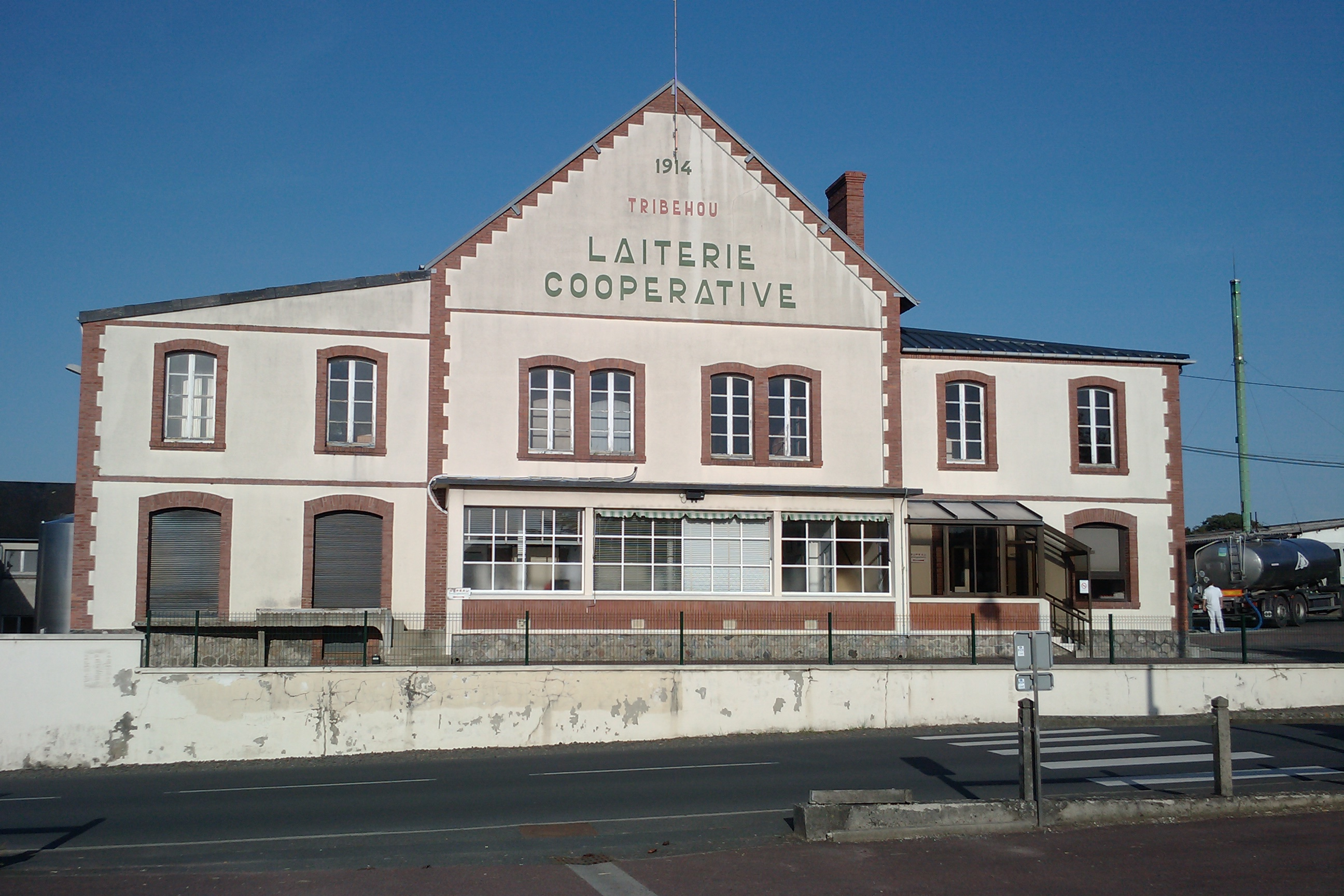 laiterie de Tribehou (1914-2011) appartenant aux Maitres laitiers du Cotentin